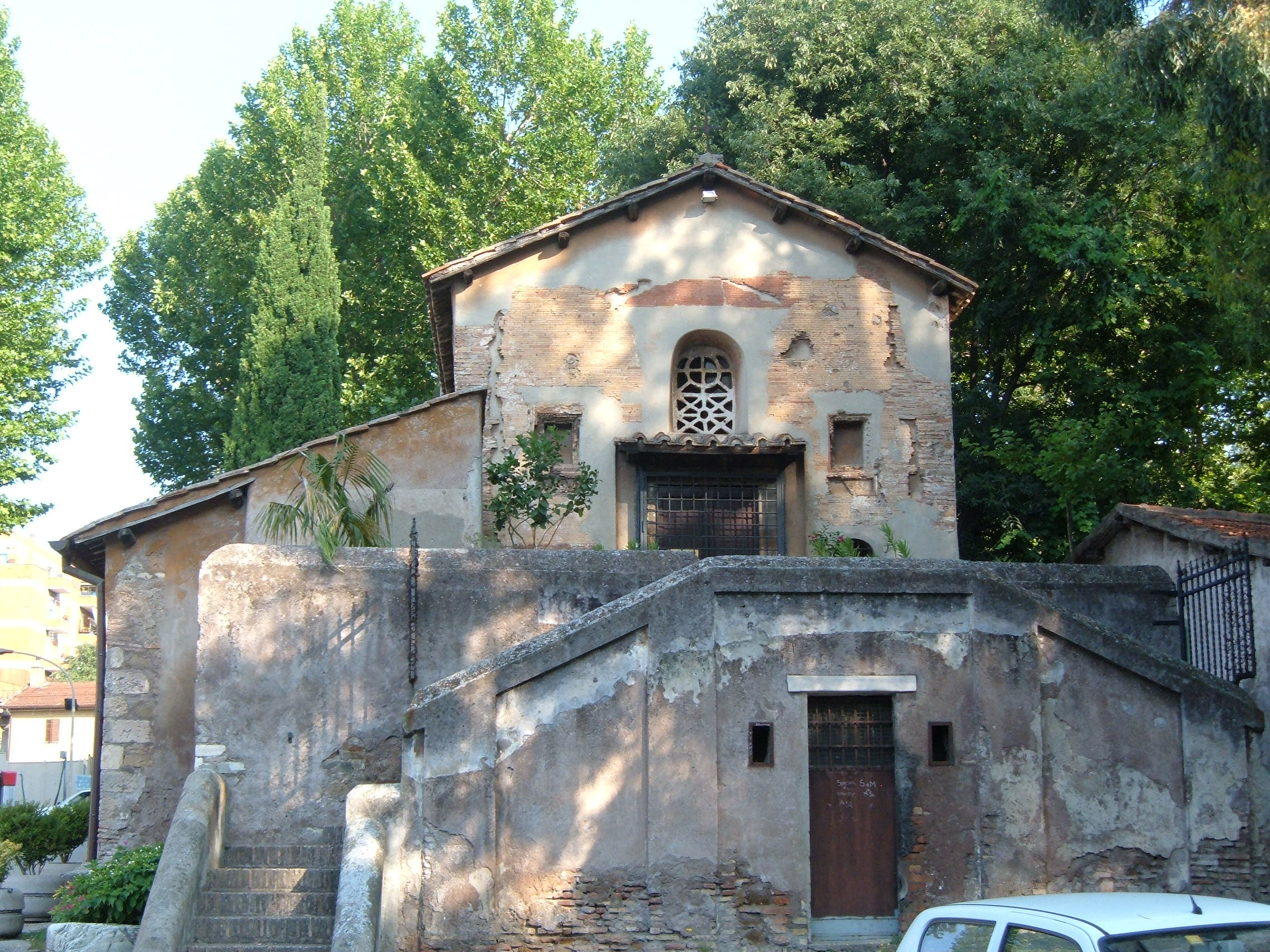 Chiesa di Santa Passera, a Roma, nel quartiere Portuense.